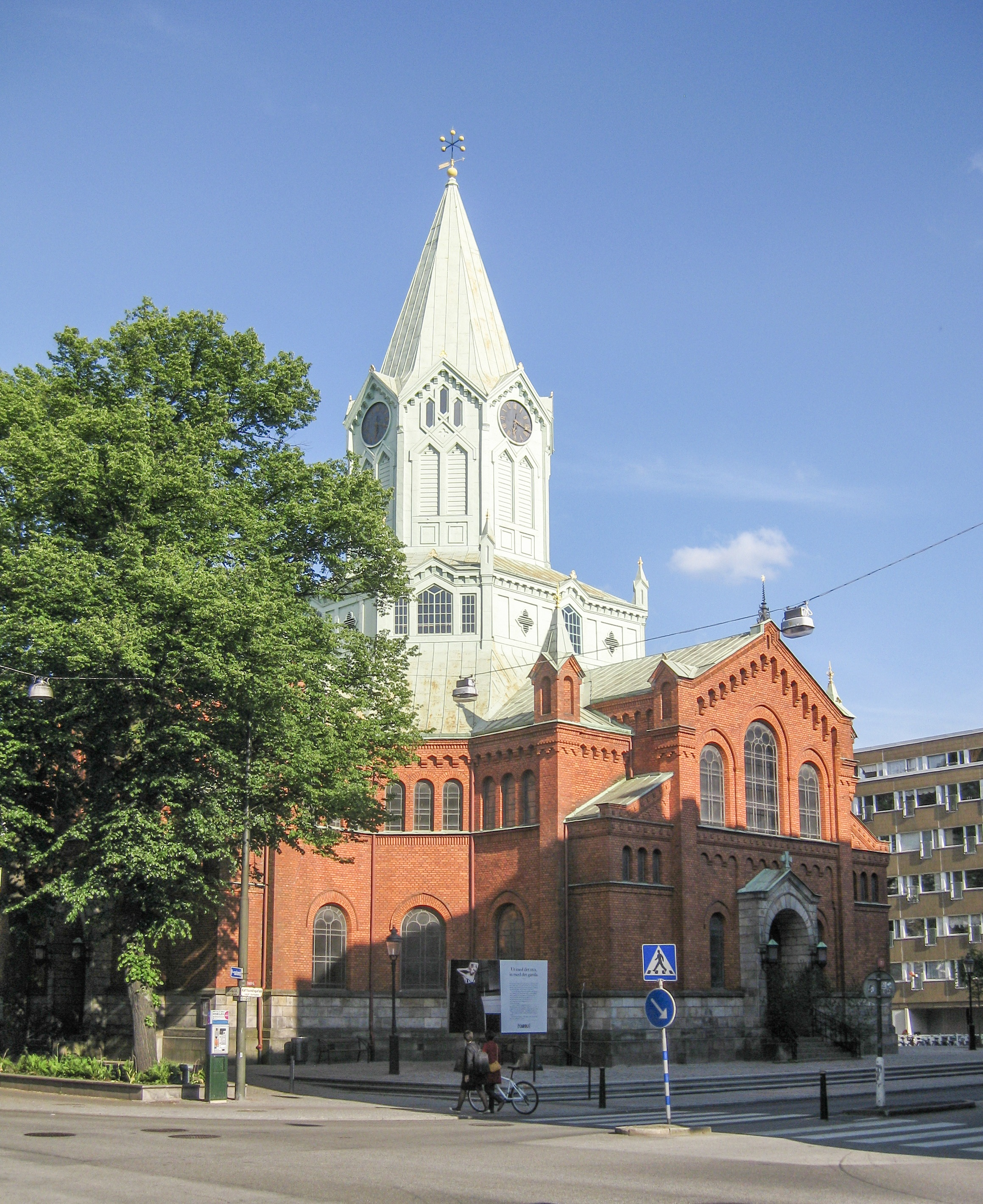 Caroli kyrka i Malmö, numera avkristnad